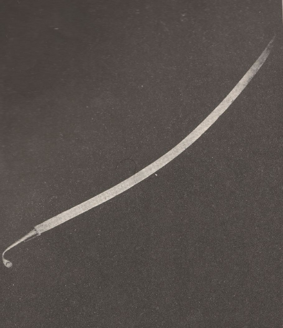 Kütahyalı Gazi Hüseyin Paşa'nın Kılıcı